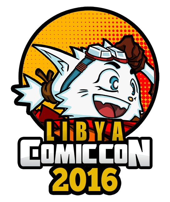 شعار ليبيا كوميك كون 2016